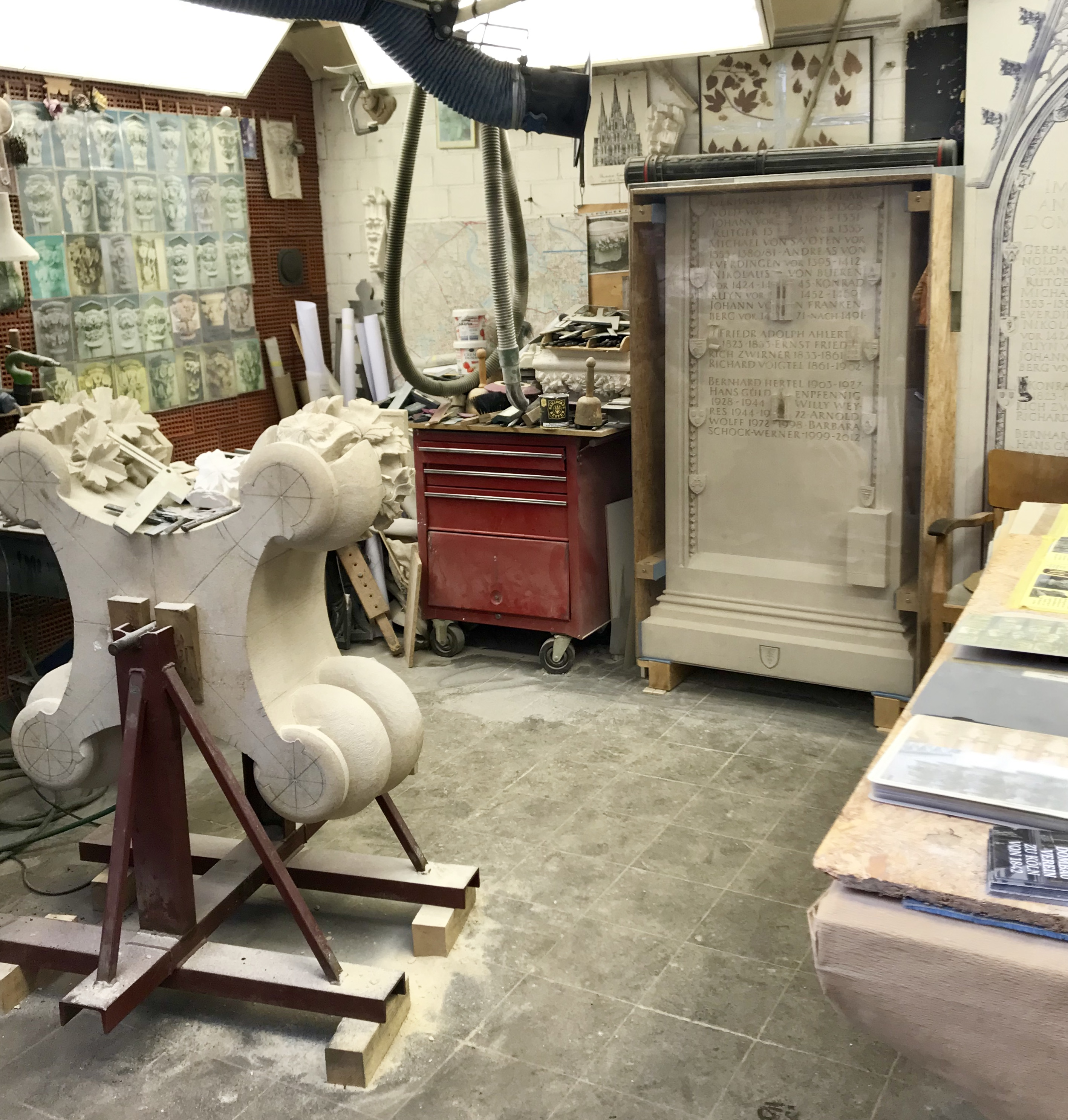 Kölner Dombauhütte: Werkstatt der Steinmetzen. Bearbeitung eines Werkstückes aus Sandstein, das als Kapitell dienen wird.